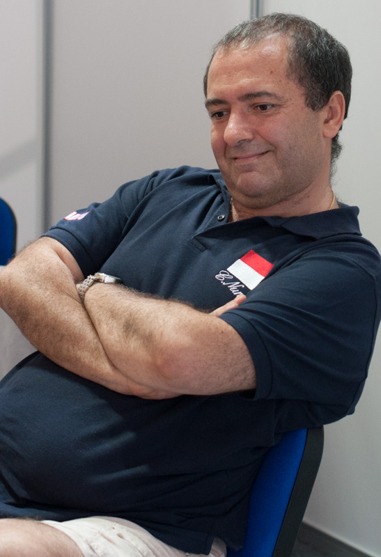 Monaco Nunes Claudia